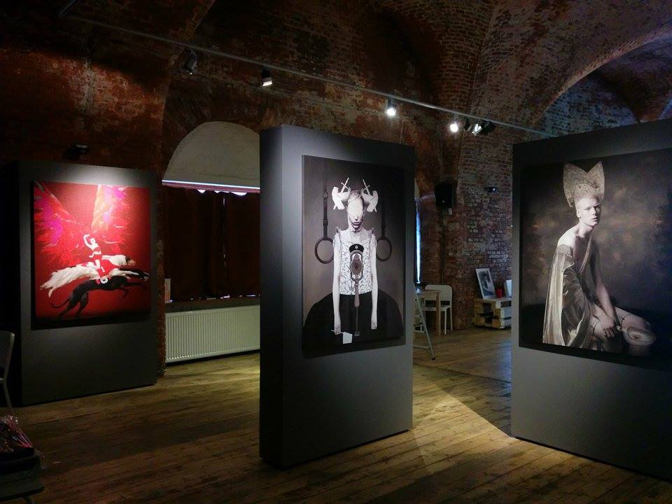 Выставка Игоря Скалецкого в арт-платформе «Ворота»